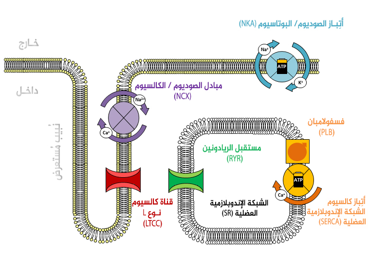 مخطط يوضح البروتينات المفتاحية في تدوير الكالسيوم القلبي وتقارن الاستثارة والتقلص